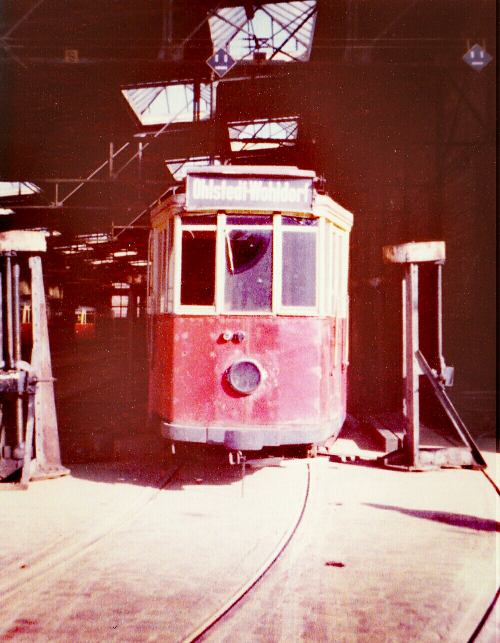 Der letzte Triebwagen der 1961 eingestellten elektrischen Kleinbahn Alt-Rahlstedt–Volksdorf–Wohldorf war im Betriebshof K der HHA bis zu seiner Auflösung am 22. Mai 1977 untergestellt.